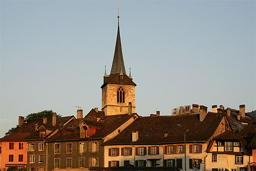 Altstadt von Biel im Morgenlicht; St.Benedikt-Kirche